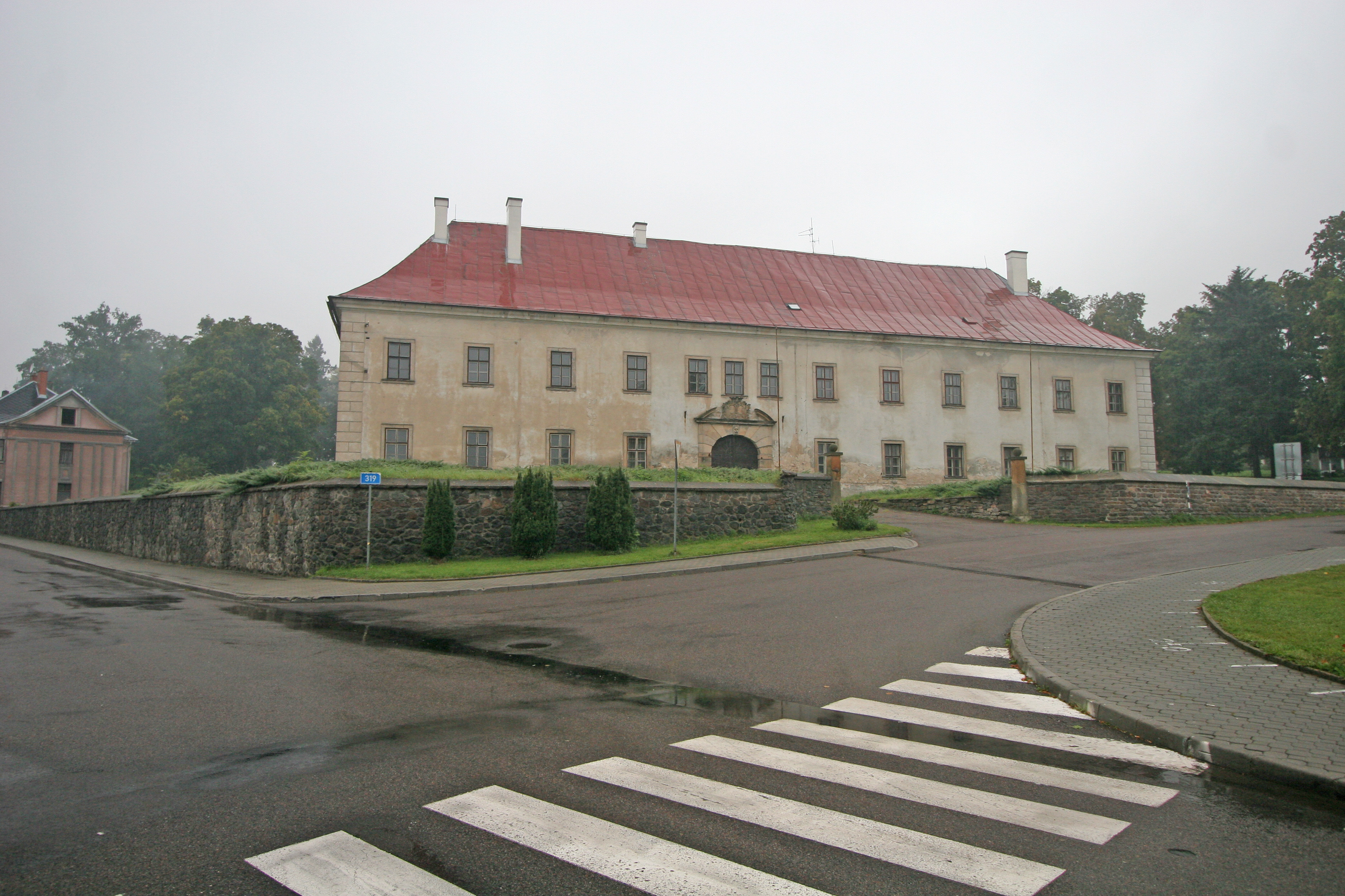 Zámek Rokytnice v Orlických horách, nám. T. G. Masaryka 1, Rokytnice v Orlických horách